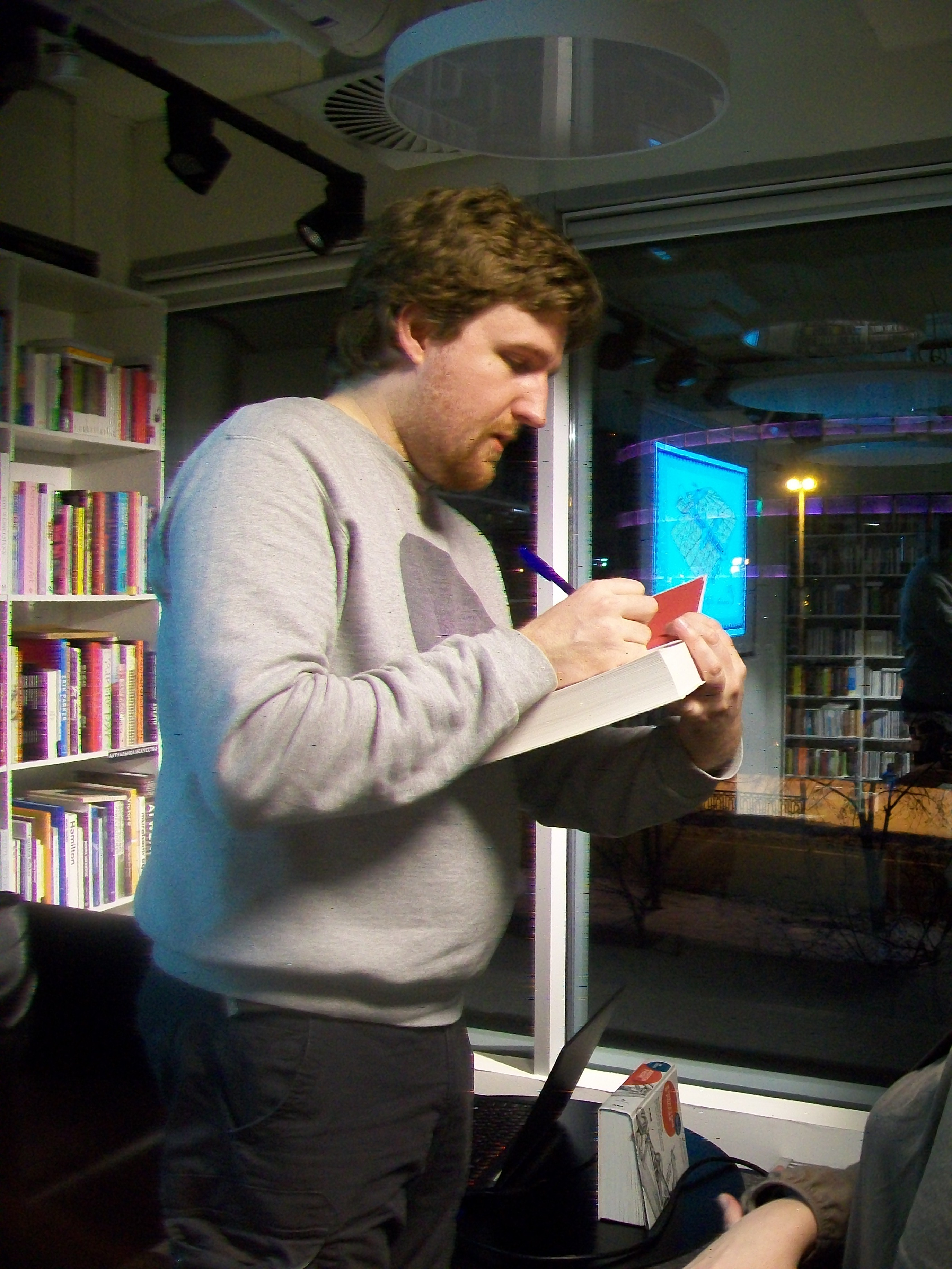 Тимофей Скоренко подписывает книгу в магазине "Пиотровский". Ельцин-центр. 3 марта 2018 года